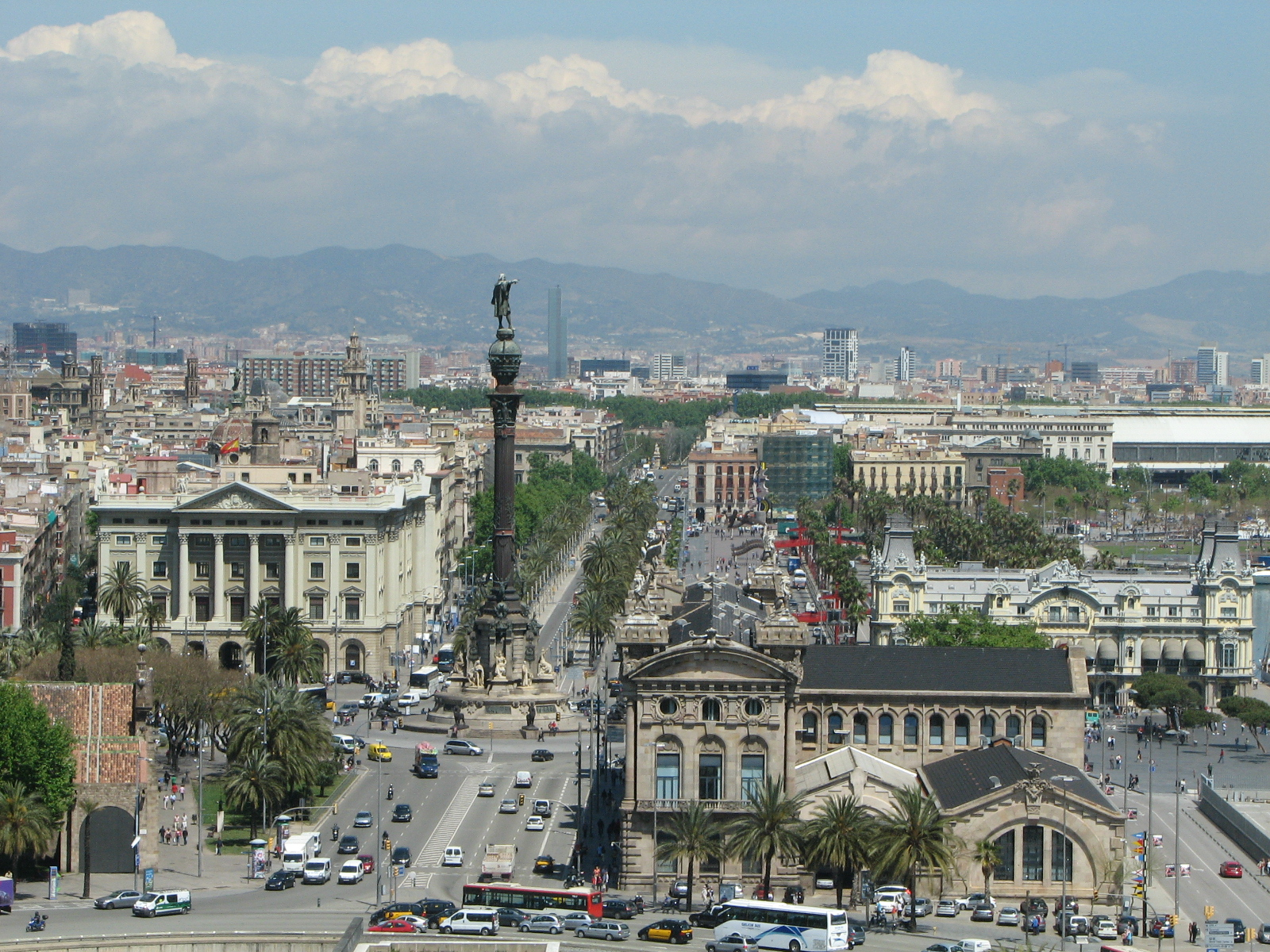 Barcelona